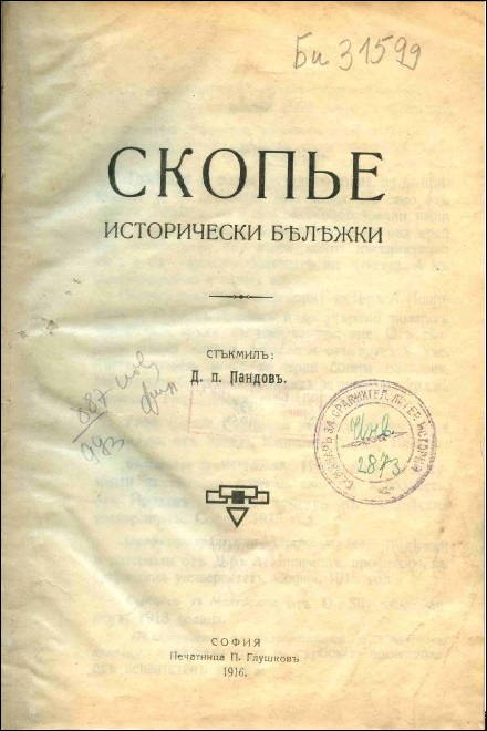 Корица на книгата "Скопье. Исторически бележки", София, 1916 г. от революционера от ВМОРО Димитър Попандов от с. Ваташа, Кавадарско, Вардарска Македония